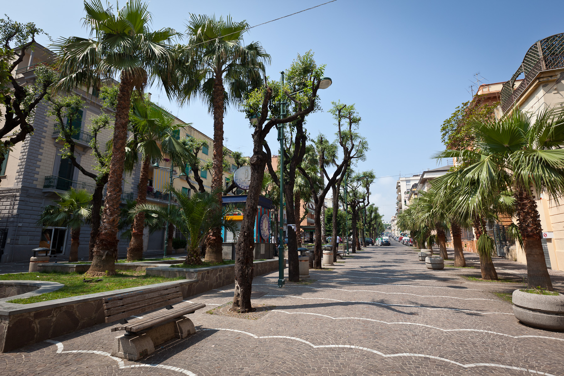 Napoli